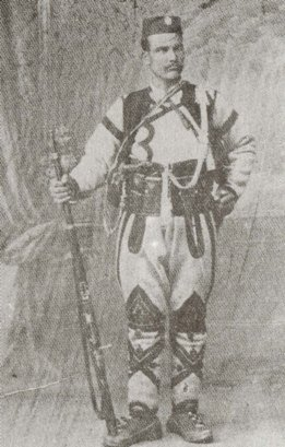 Petko Ilich